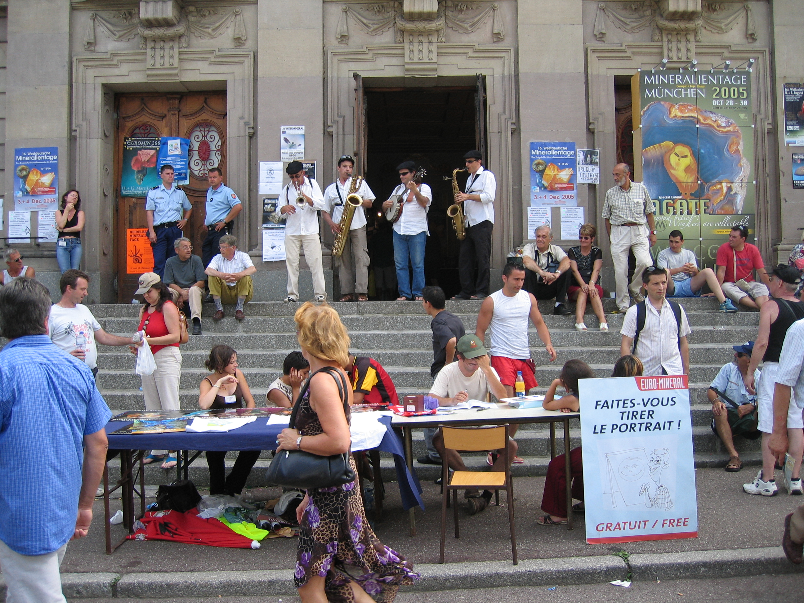 Musica frente al Teatro de Sainte-Marie-aux-Mines